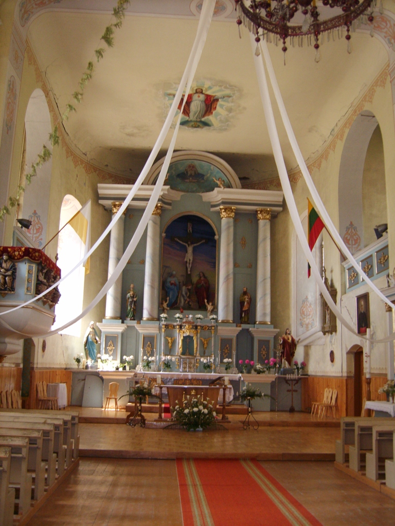 Laukuvos Šv. Kryžiaus Atradimo bažnyčia